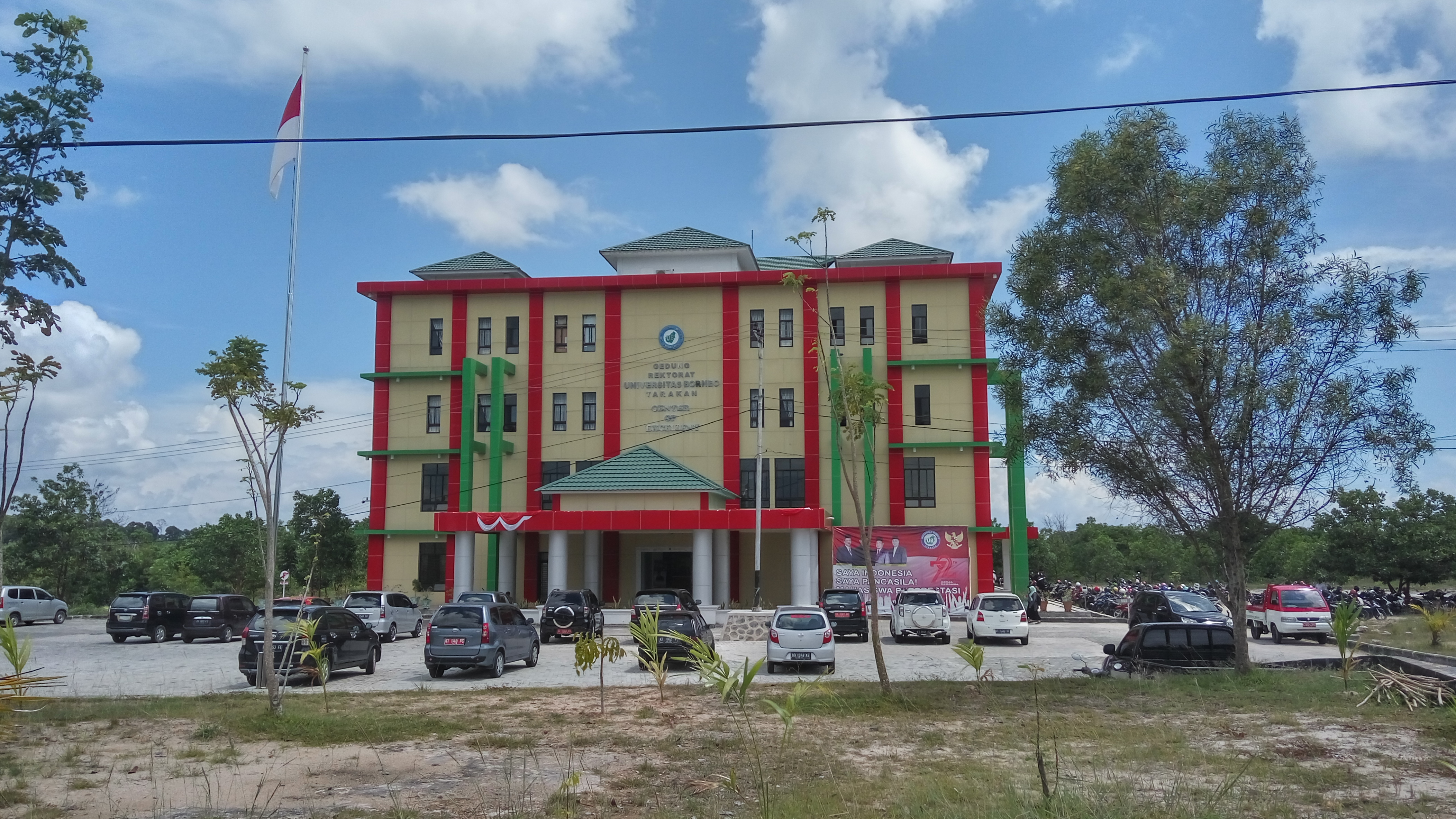 Gedung rektorat Universitas Borneo Tarakan